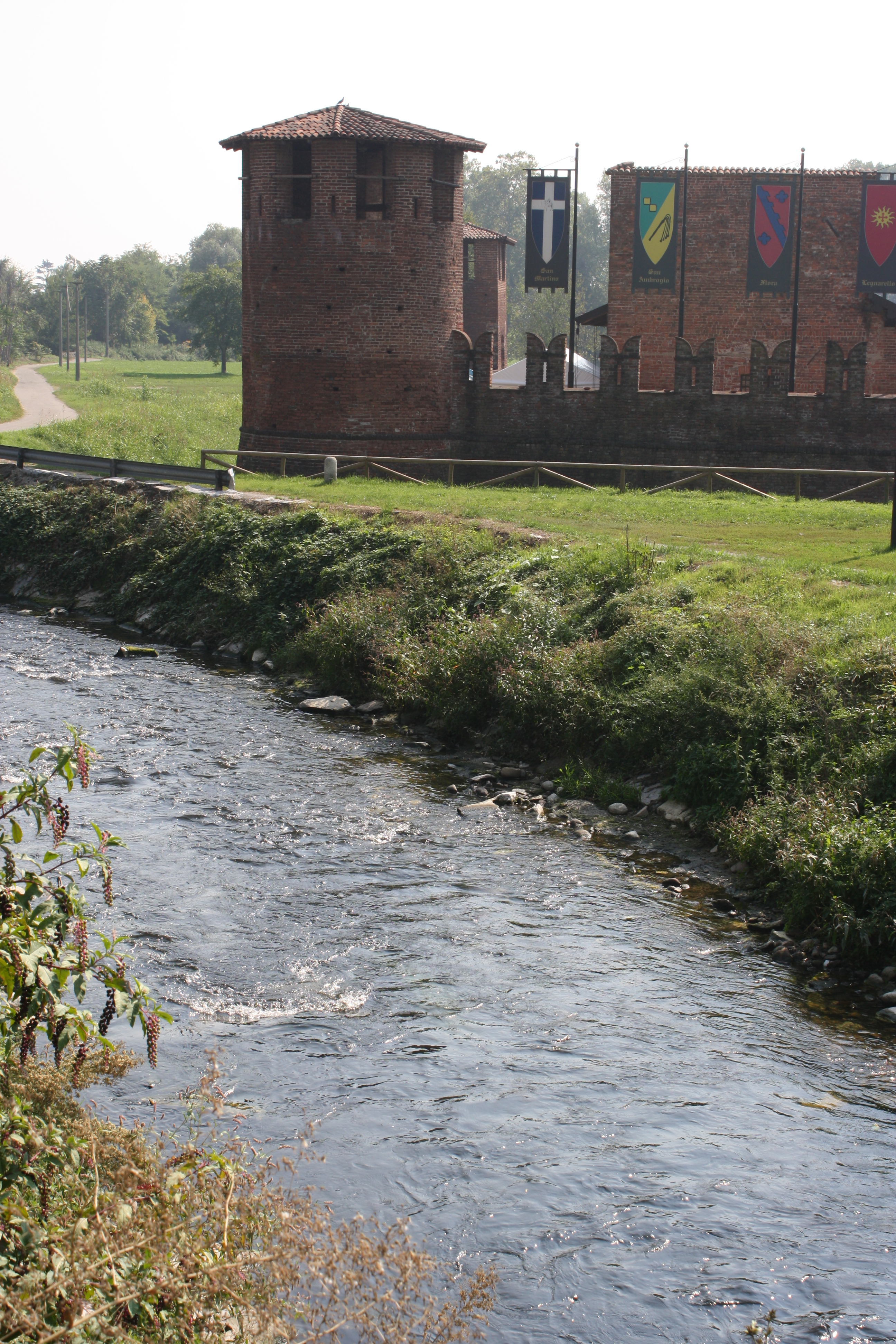 Castello di San Giorgio This is a photo of a monument which is part of cultural heritage of Italy.